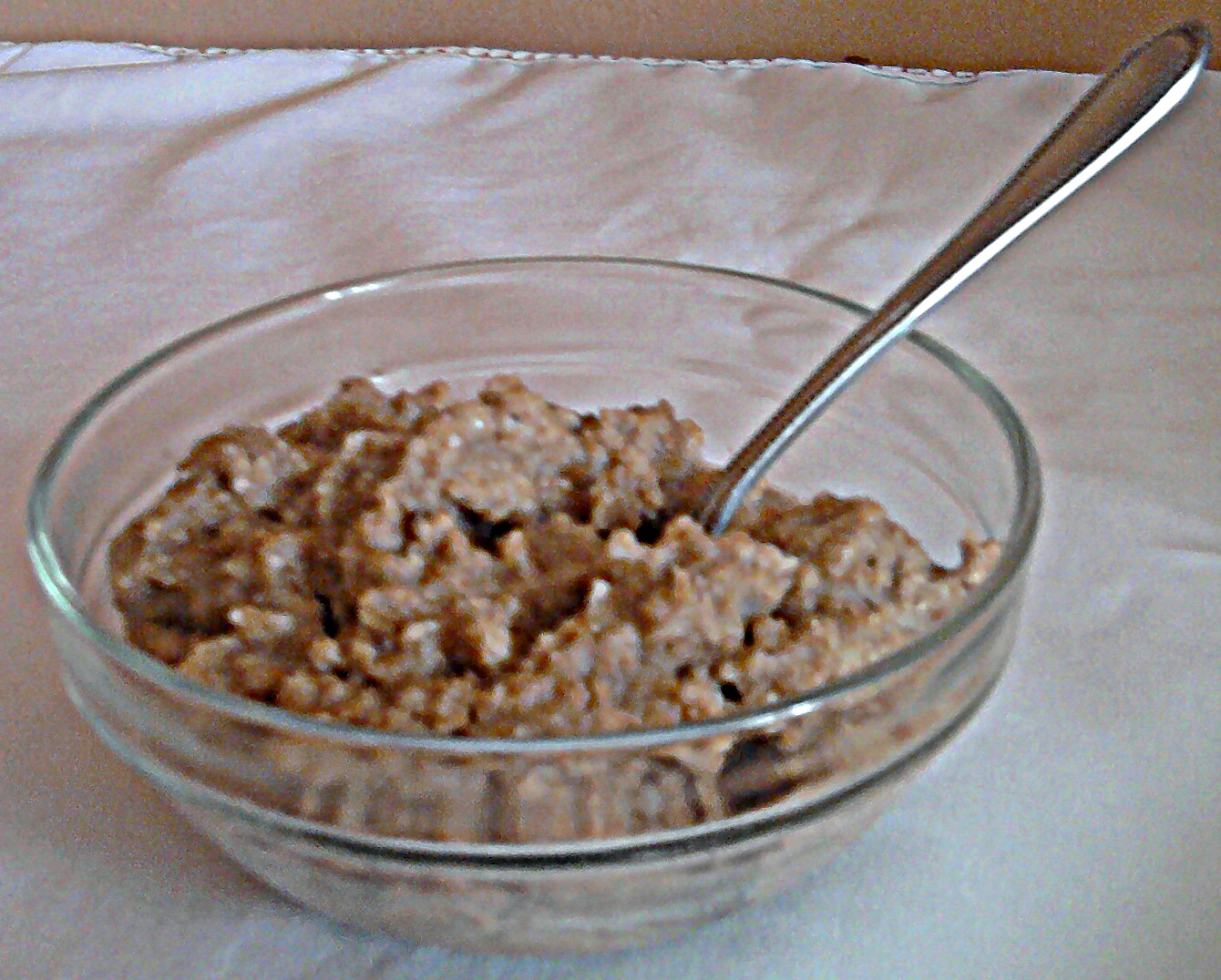 Imagen con la preparación clásica del plato de comida llamado cocho.